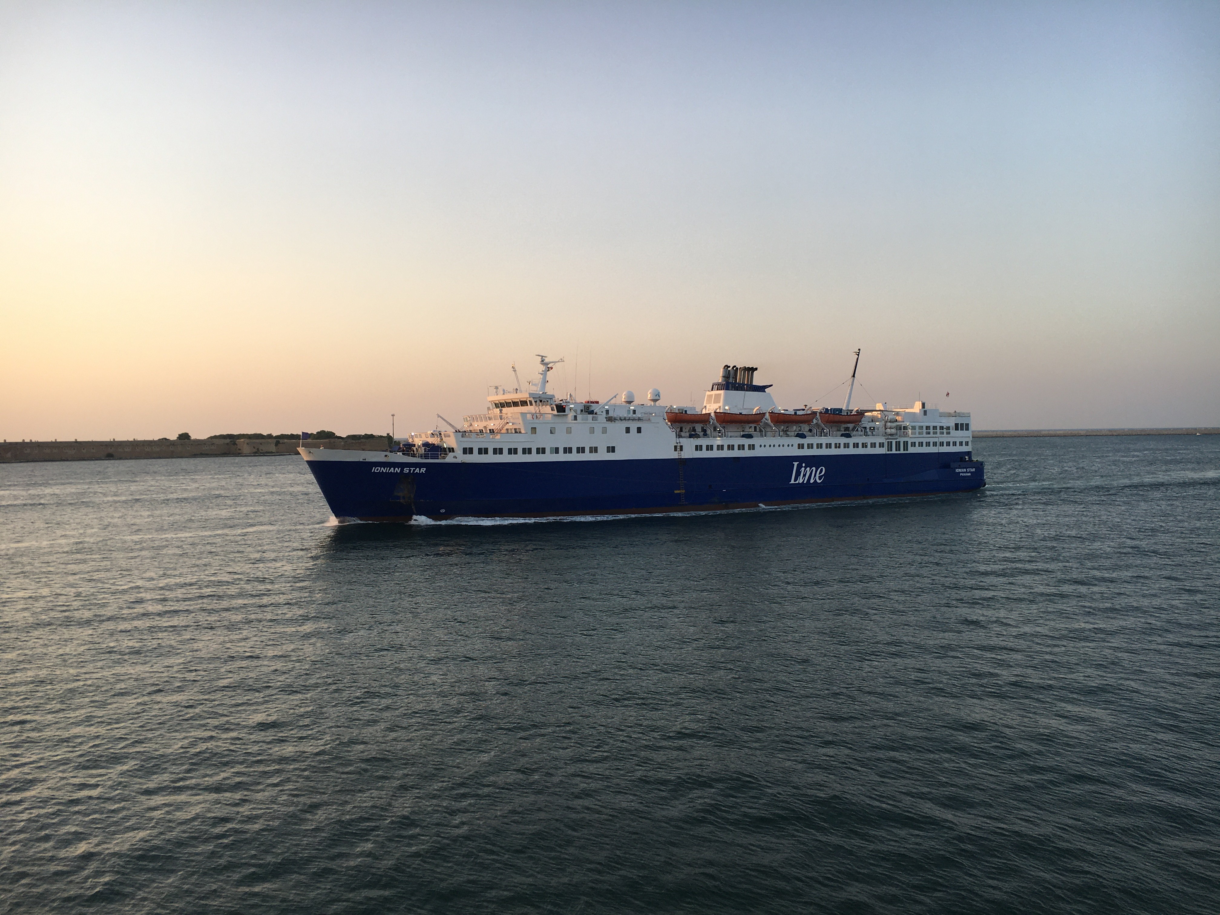 Il traghetto Ionian Star in arrivo a Brindisi da Valona